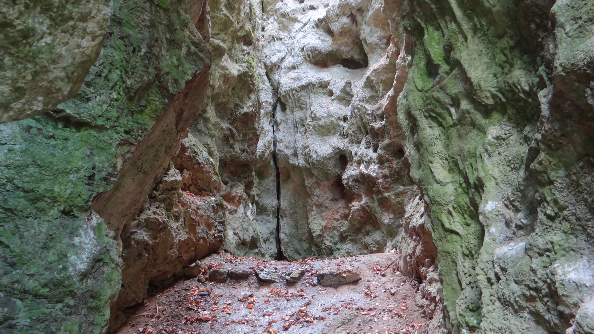 Komin Prawej Nogi Baby w skałach Dudnik w Podlesicach